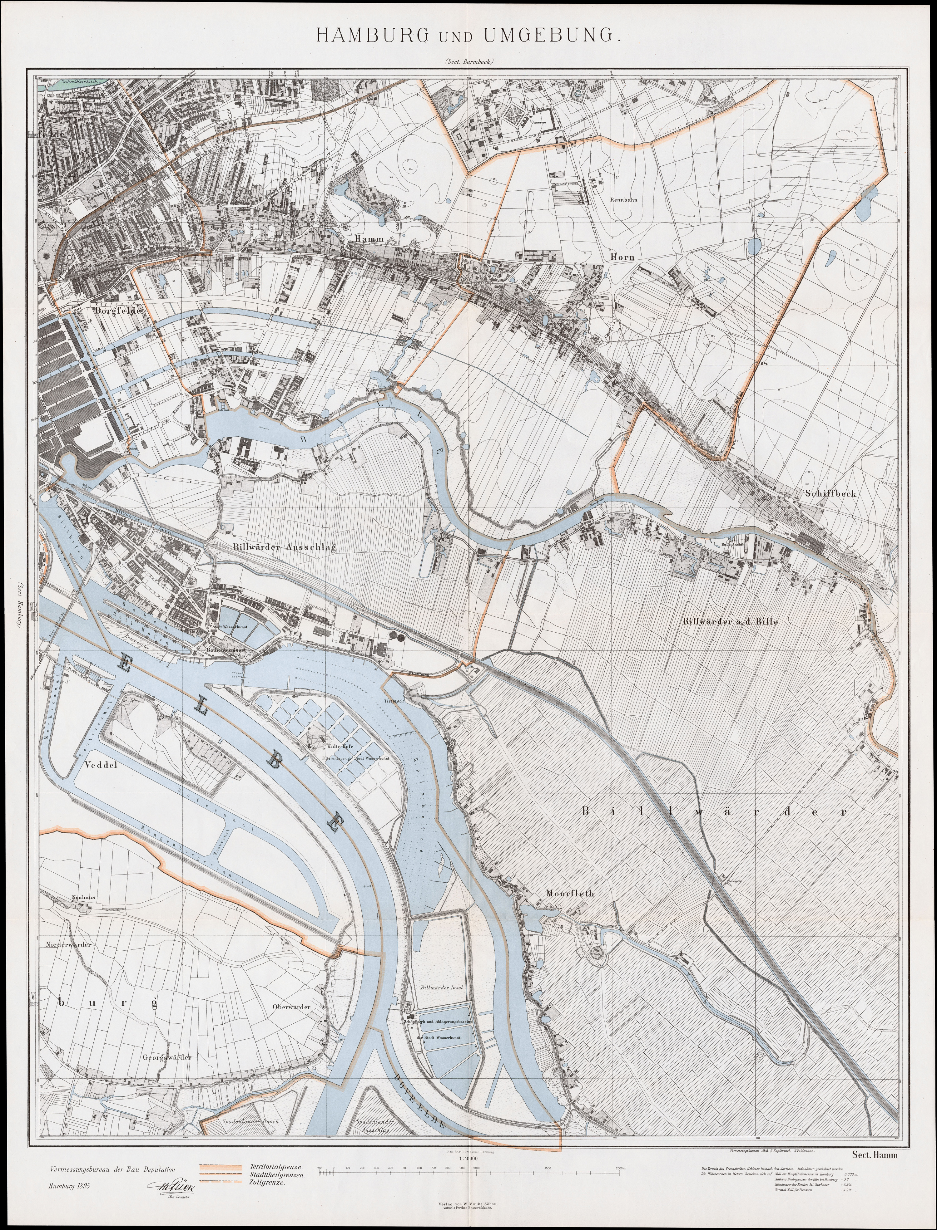 Karte von Hamburg, Section Hamm mit Stadtteil Moorfleet